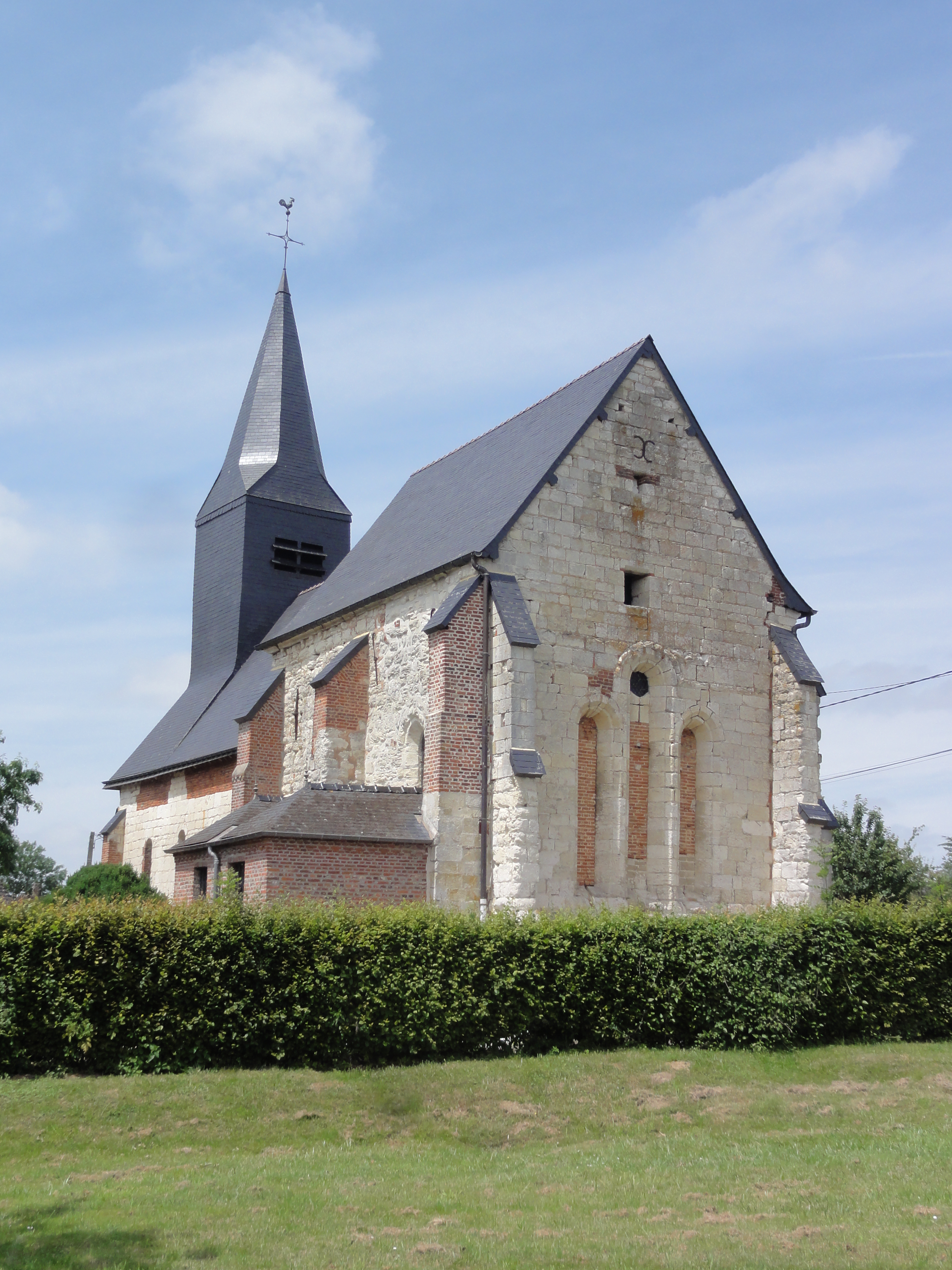 Sainte-Geneviève (Aisne) Église Sainte-Geneviève, chevet